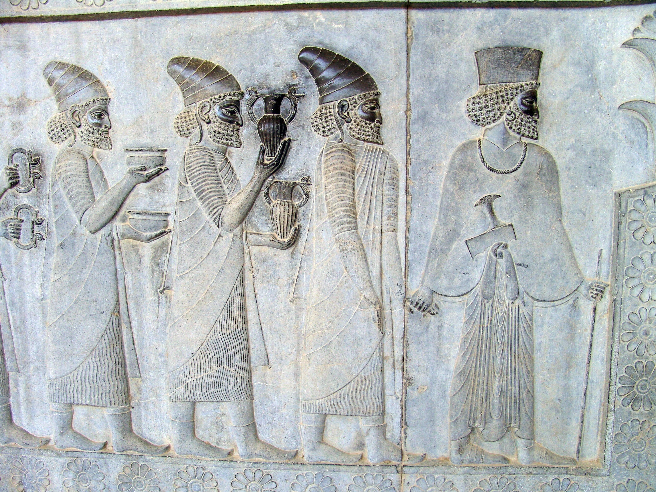 هیئت‌های نمایندگی در پلکان شرقی آپادانا، تخت‌جمشید، ایران